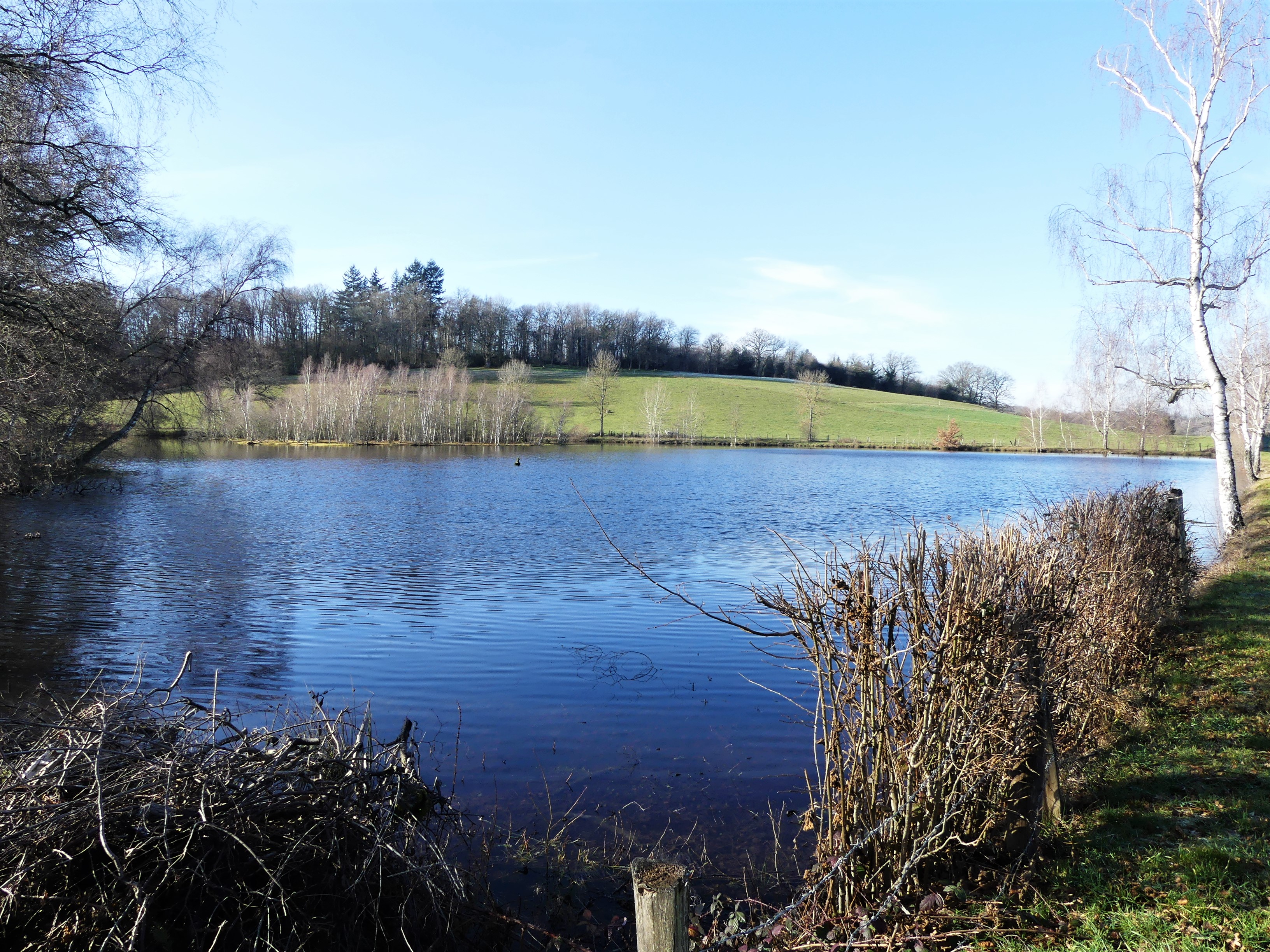 Étang en bordure de la route départementale 990, au sud du lieu-dit les Coutures, Saint-Dizier-la-Tour, Creuse, France.